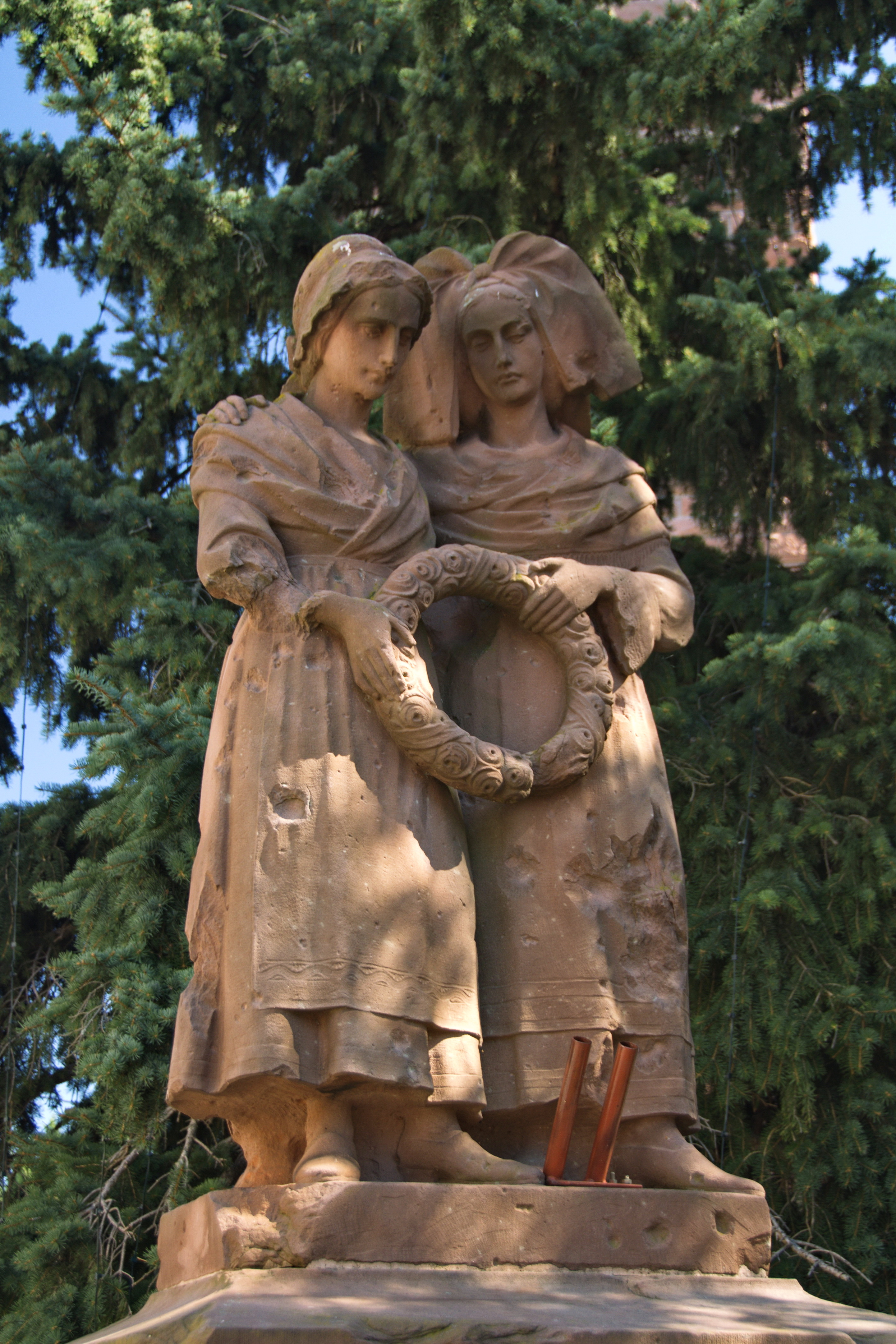 Monument de la Fidélité, Place de la MairiePlace de l'Église (InscritInscrit, 19961996) .